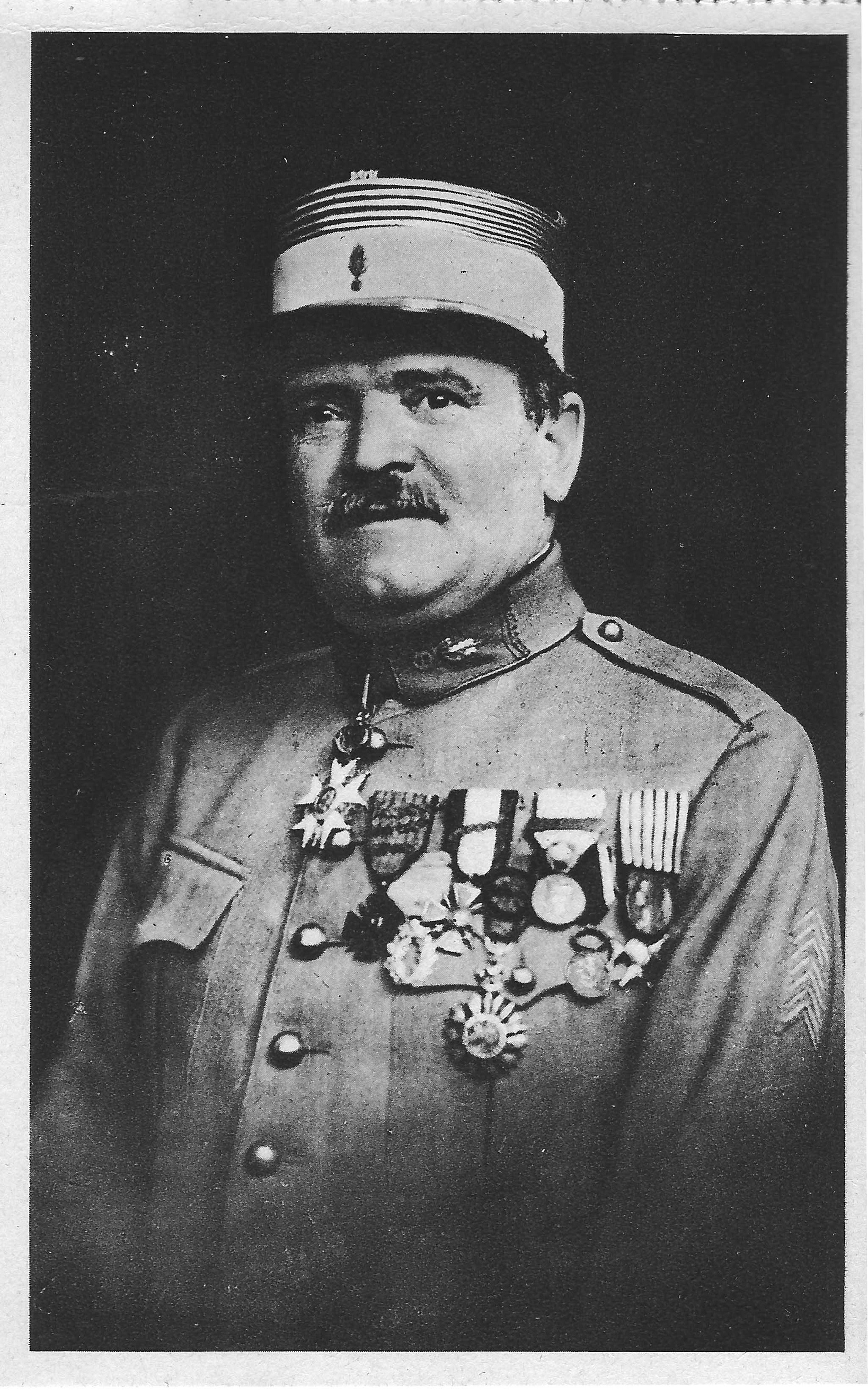 Carte postale de la collection Fort de Vaux, Le_commandant_Raynal.